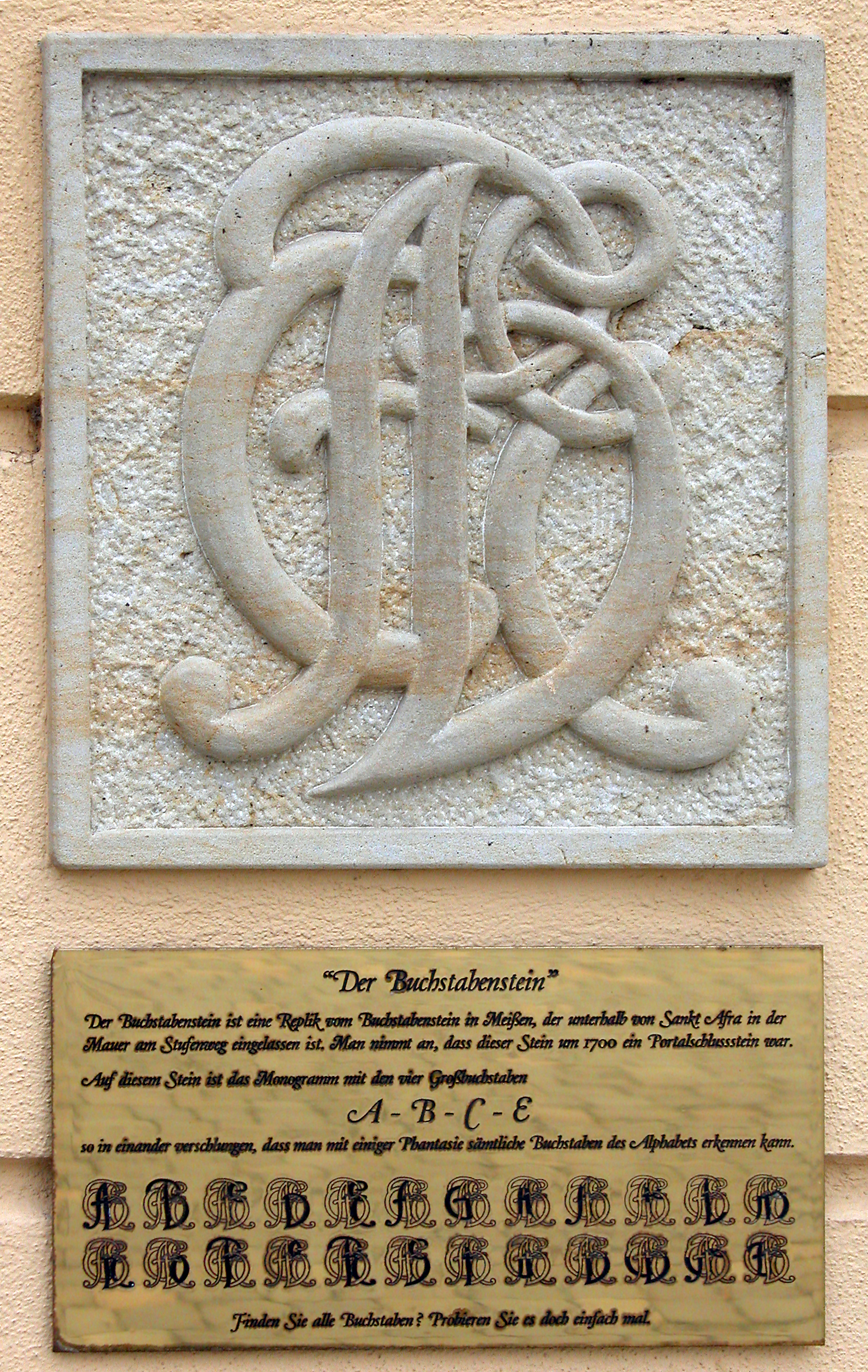 21.02.2010 01067 Dresden-Altstadt: Am Steigenberger Hotel, Neumarkt 9 (GMP: 51.050700,13.741120): Replik des Buchstabensteins von Meißen, der dort am Seelenhaus, Freiheit 10 / Beginn Seelensteig unterhalb von Sankt Afra in der Mauer am Stufenweg eingelassen ist. Man nimmt an, dass der Stein um 1700 ein Portalschlußstein war. Auf dem Stein ist das Monogramm mit den vier Buchstaben A - B - C -E so ineinander verschlungen, dass man mit einiger Phantasie sämtliche Buchstaben des Alphabets erkennen kann. [DSCN40403.TIF]20100221050DR.JPG(c)Blobelt